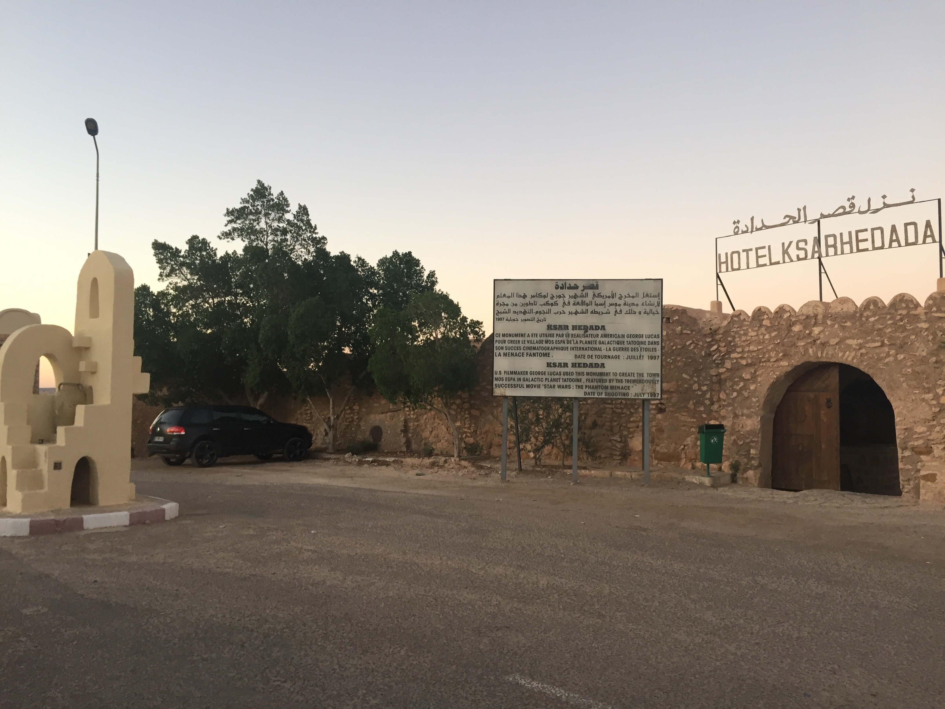 Façade de l'hôtel Ksar Hadada juillet 2016.